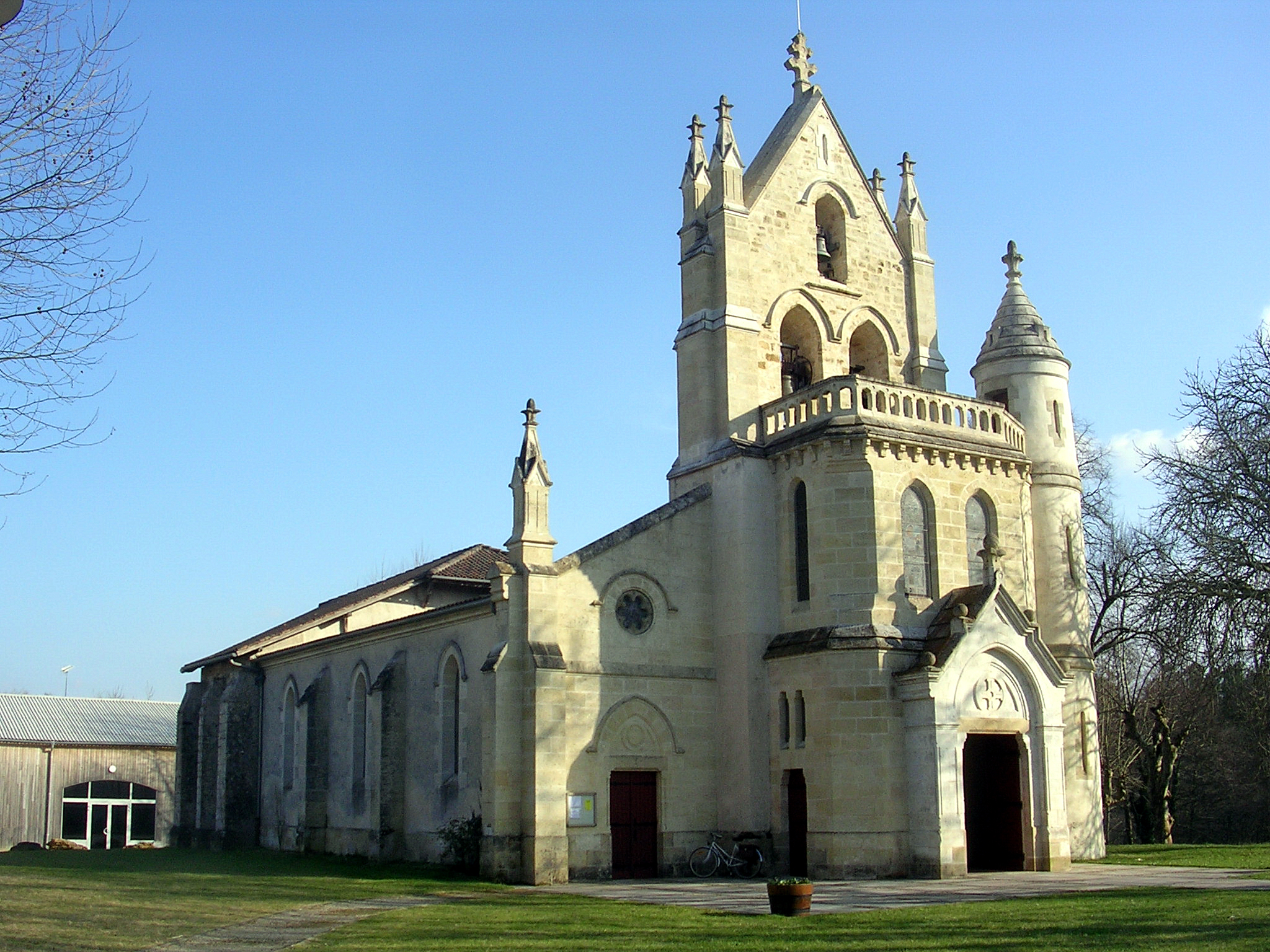 Eglise Saint-Jean-Baptiste de Sore, dans le département français des Landes